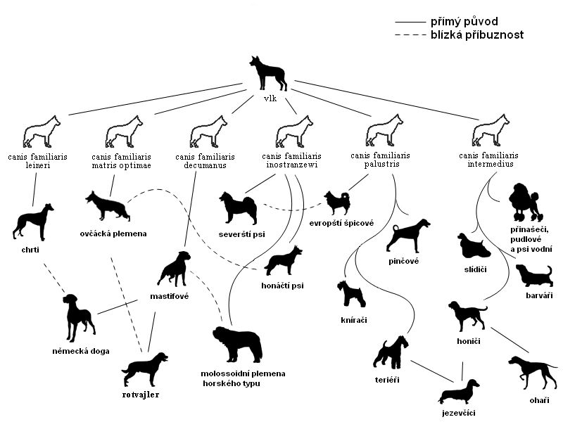 scheme of dog breeds with illustration of relationship (description in czech)